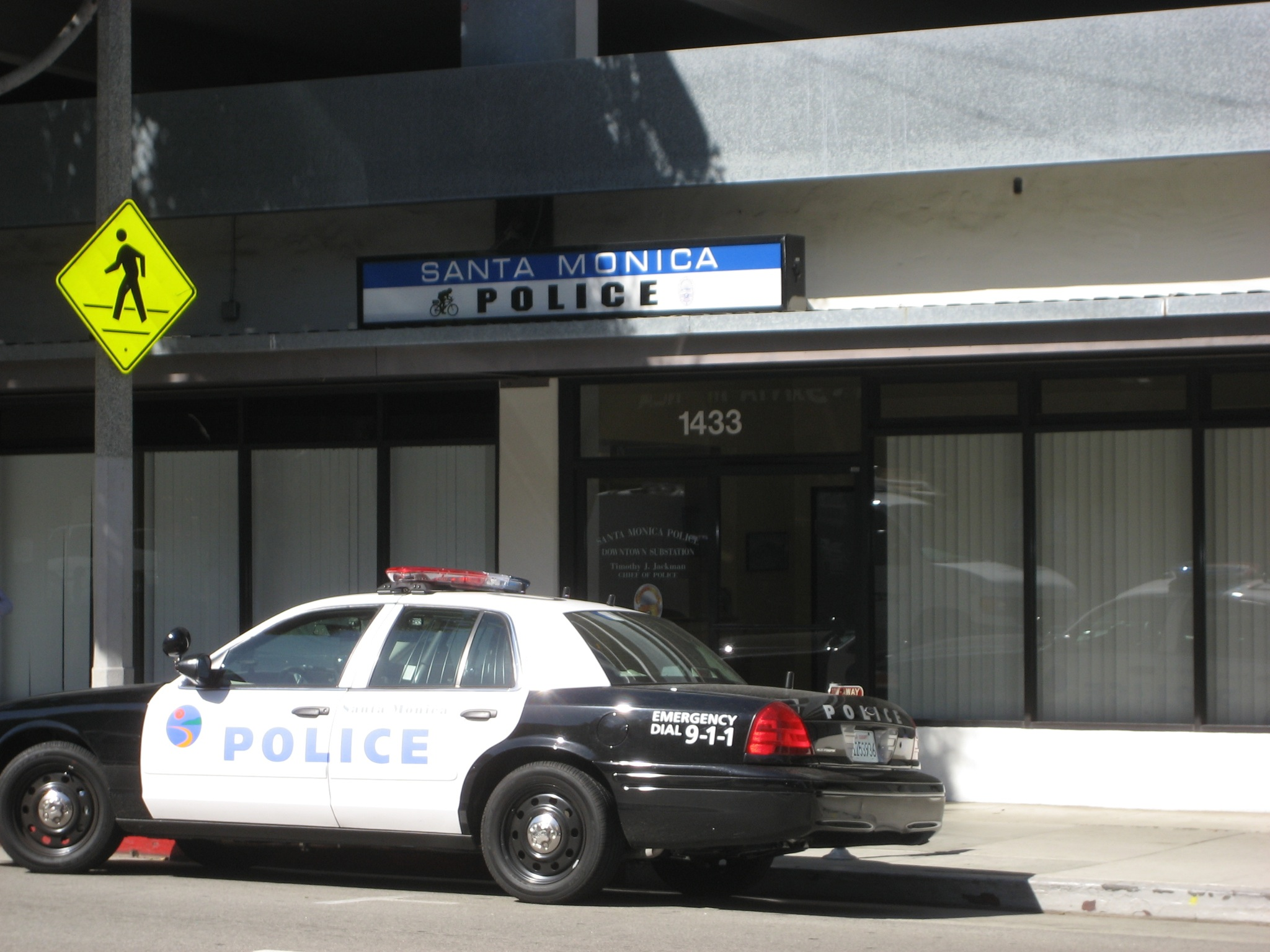 Santa Monica Police Department.